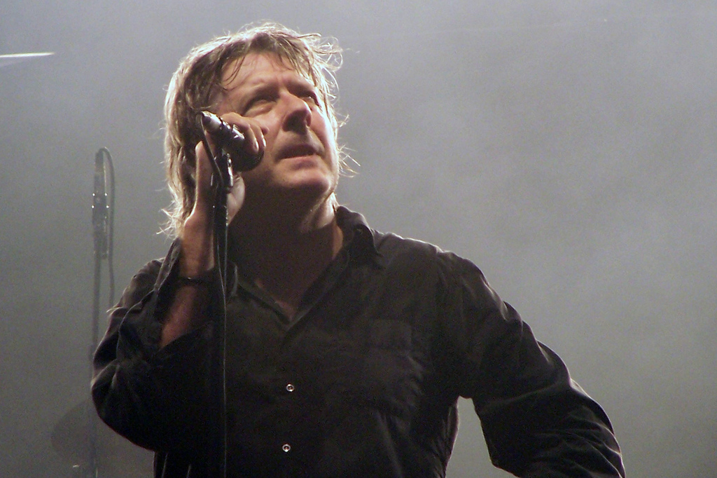 Belgian singer Arno Hintjens